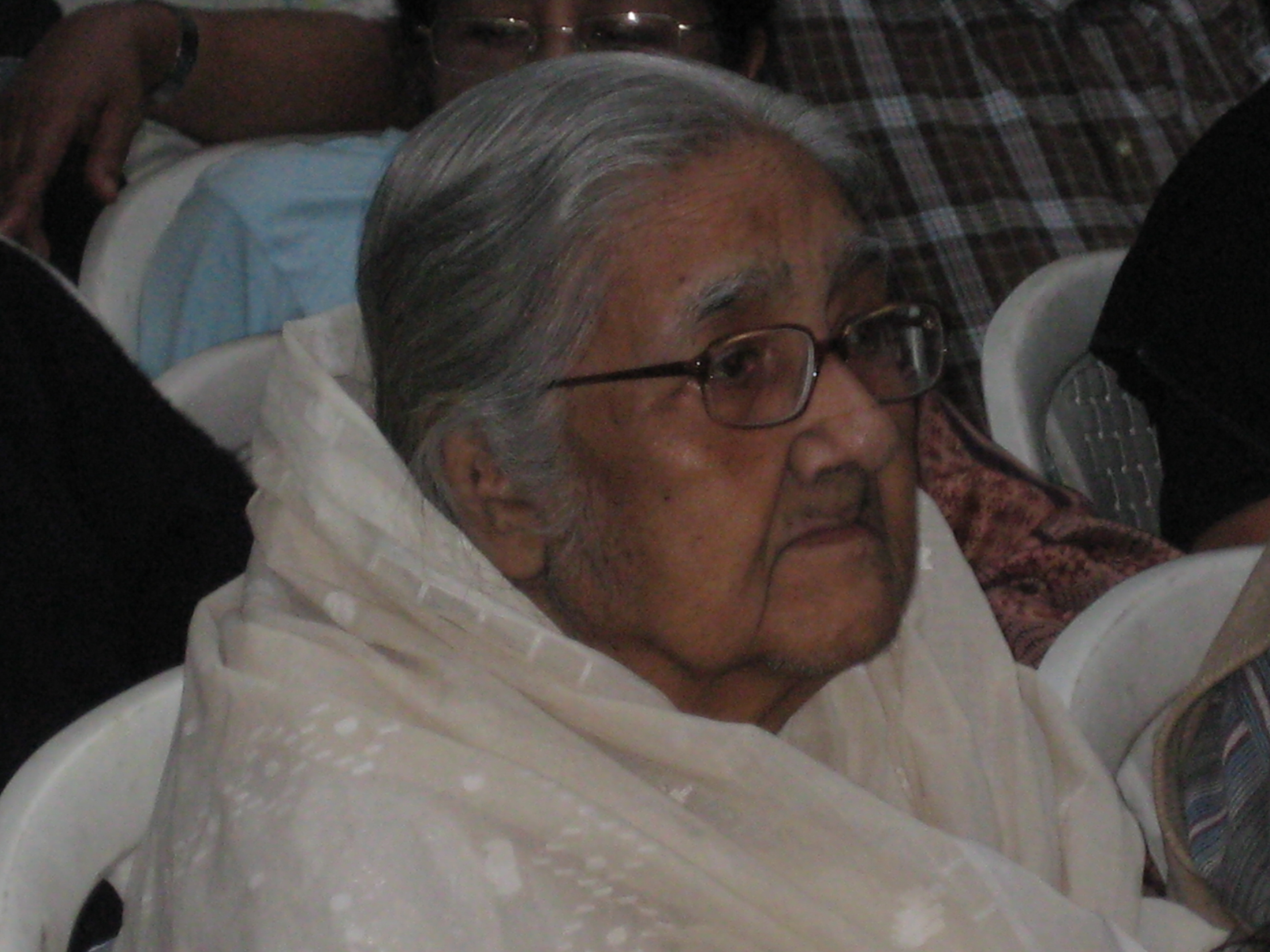 Hena Das